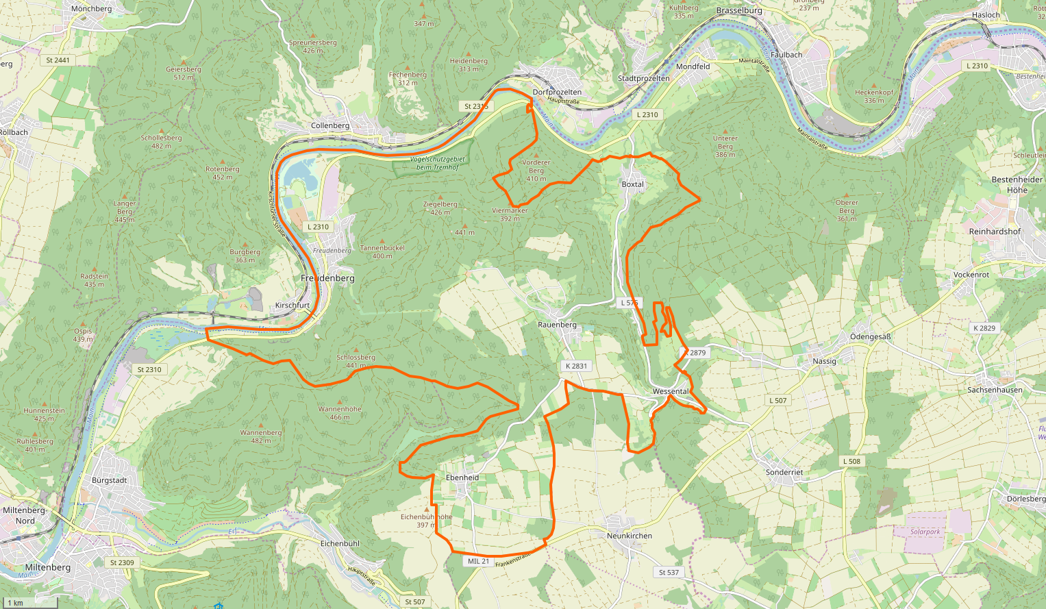 Gemarkung und Lage der Stadt Freudenberg (Baden). Siehe auch: Liste der Kulturdenkmale in Freudenberg (Baden). Gemarkungen und Lagen der Städte und sonstigen Gemeinden im Main-Tauber-Kreis: Ahorn · Assamstadt · Bad Mergentheim · Boxberg · Creglingen · Freudenberg · Großrinderfeld · Grünsfeld · Igersheim · Königheim · Külsheim · Lauda-Königshofen · Niederstetten · Tauberbischofsheim · Weikersheim · Werbach · Wertheim · Wittighausen